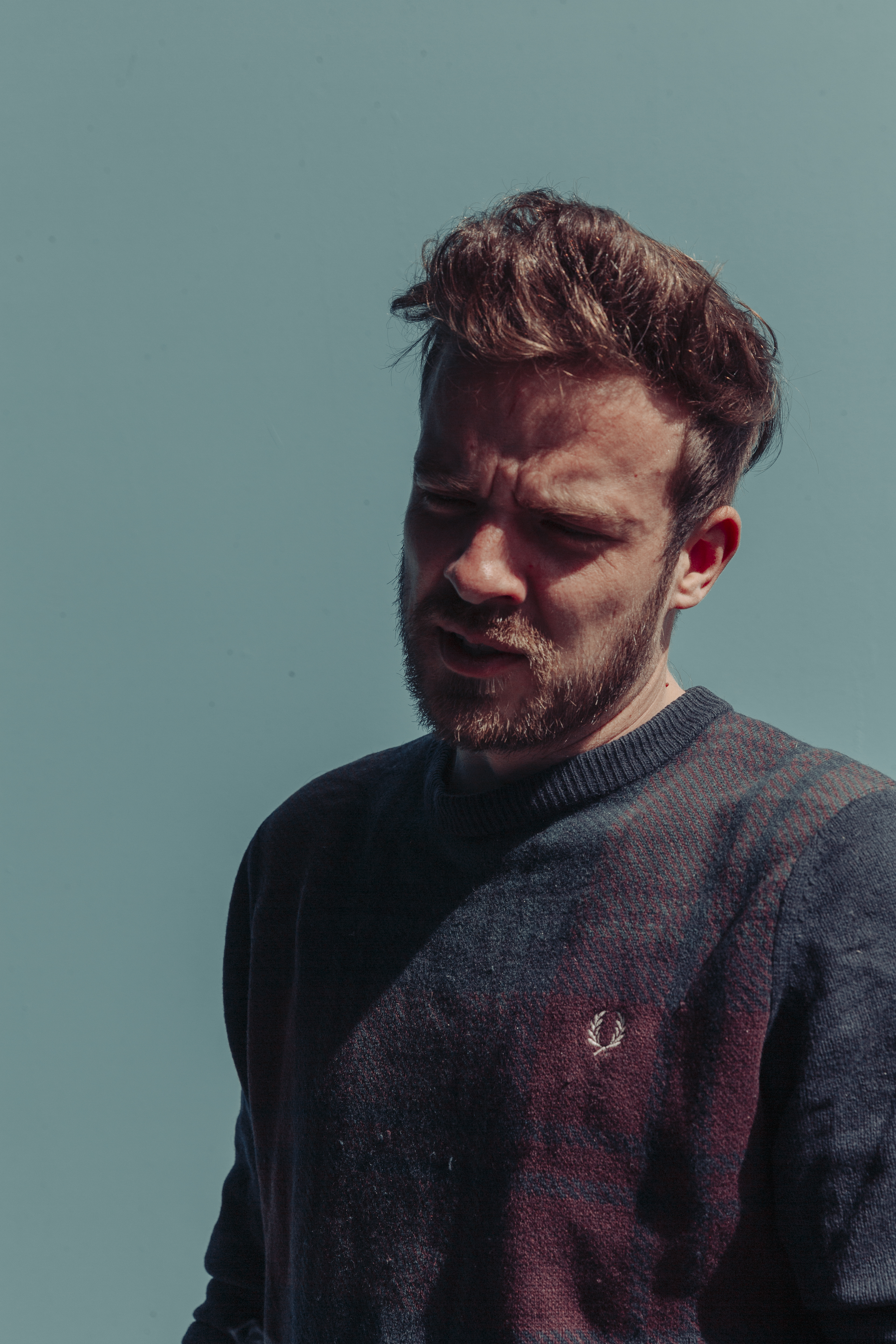 Portrait von von Zeberg